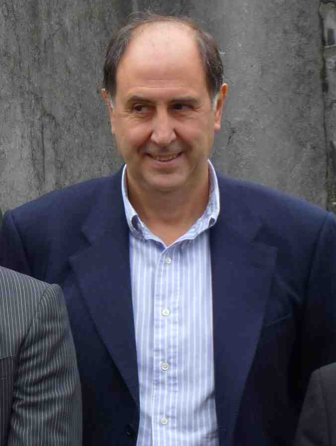 Josean Kerejeta saskibaloi jokalari ohia 2010ean.